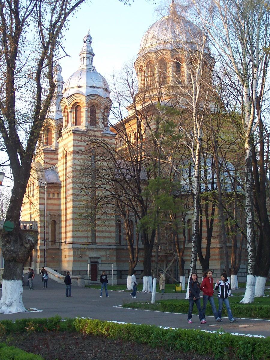 fotografie din arhiva personala